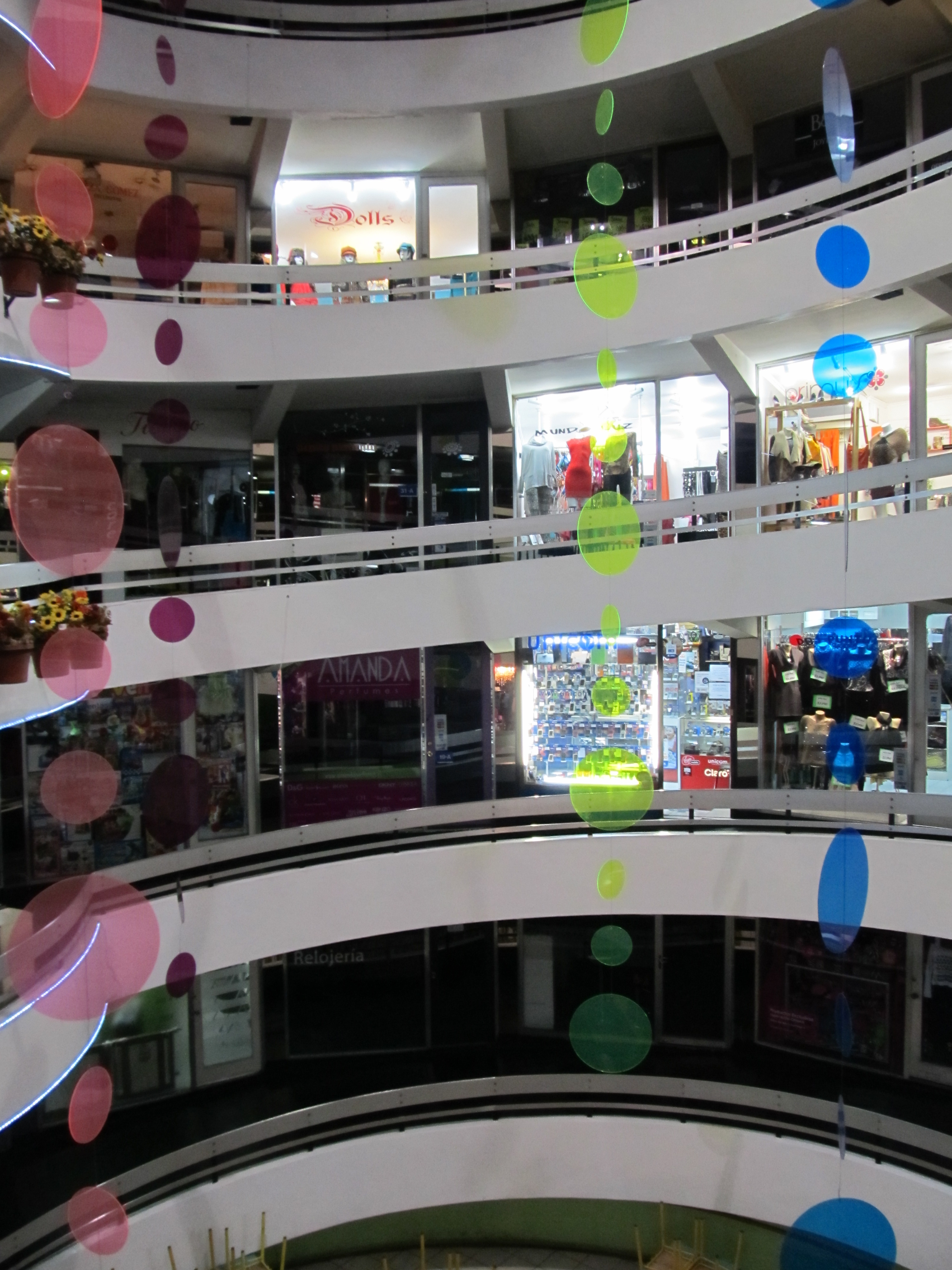 Interior galería Dos Caracoles, Providencia.